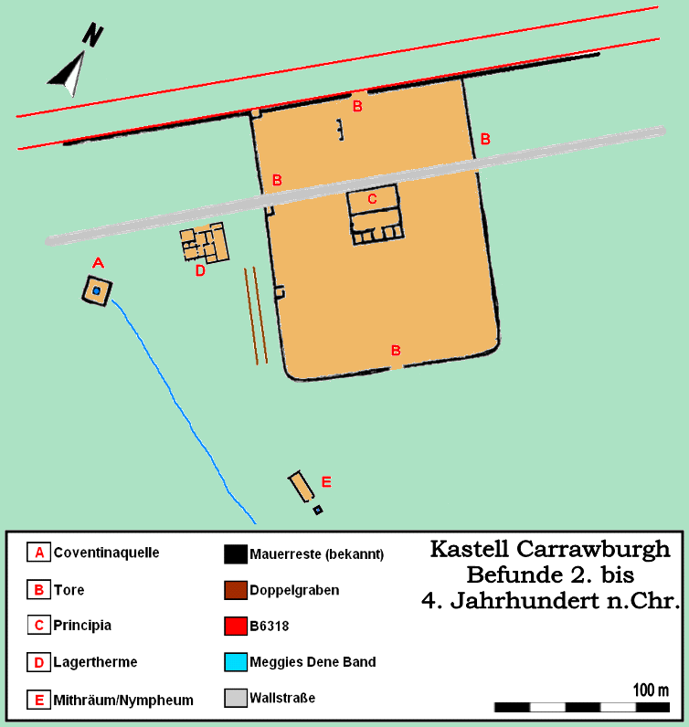 Befundskizze des Kastell Carrawburgh, Hadrianswall (GB)